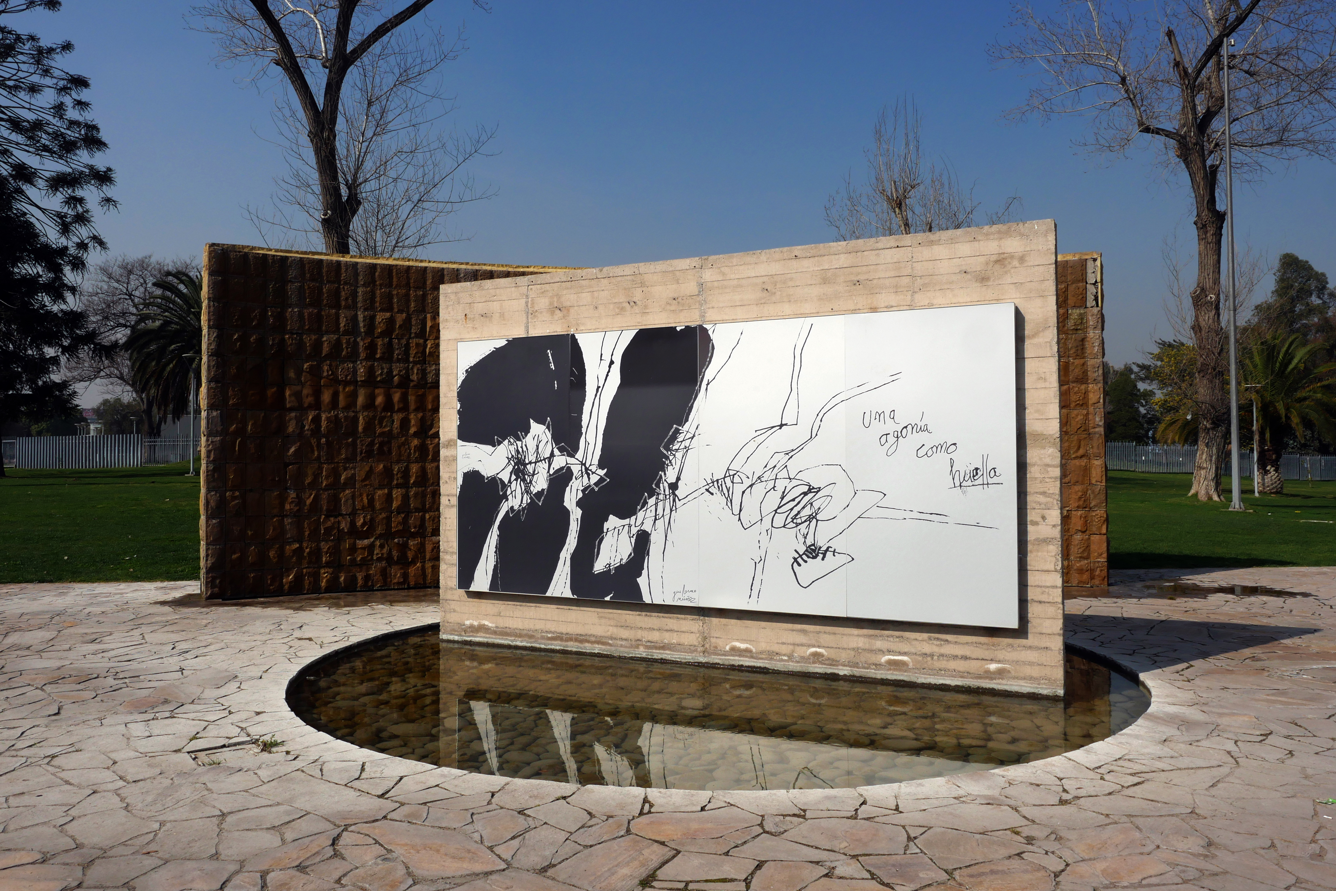 Inaugurado en el año 2014, este Memorial se ubica en el mejor punto equidistante entre la visión que tenían las prisioneras y prisioneros que se encontraban encerrados en escotillas y camarines del Coliseo y sus familiares que día a día se apostaban en la Avenida Grecia para saber del destino de ellos. Su principal obra pertenece al Premio Nacional de Arte Guillermo Núñez (2007). En ella se representa el dolor de un prisionero en la tortura; de un prisionero, no sólo del Estadio Nacional, sino de todos los Centros de Detención, Campos de Concentración y Exterminio a nivel nacional; de ahí el sentido nacional -su particularidad- que tiene este Sitio de Memoria. La leyenda “Estuviste aquí” de la muralla cóncava de piedra, hace mención no sólo a las prisioneras y prisioneros que estuvieron detenidos en este Centro Deportivo, sino al ejercicio que realiza cada día el visitante al “estar acá”, conocer los hechos y reflexionar e incorporar las lecciones que las visitas guiadas le entregan para su responsabilidad individual y colectiva en relación a la promoción, protección y resguardo de los Derechos Humanos hoy en día y en su entorno social.